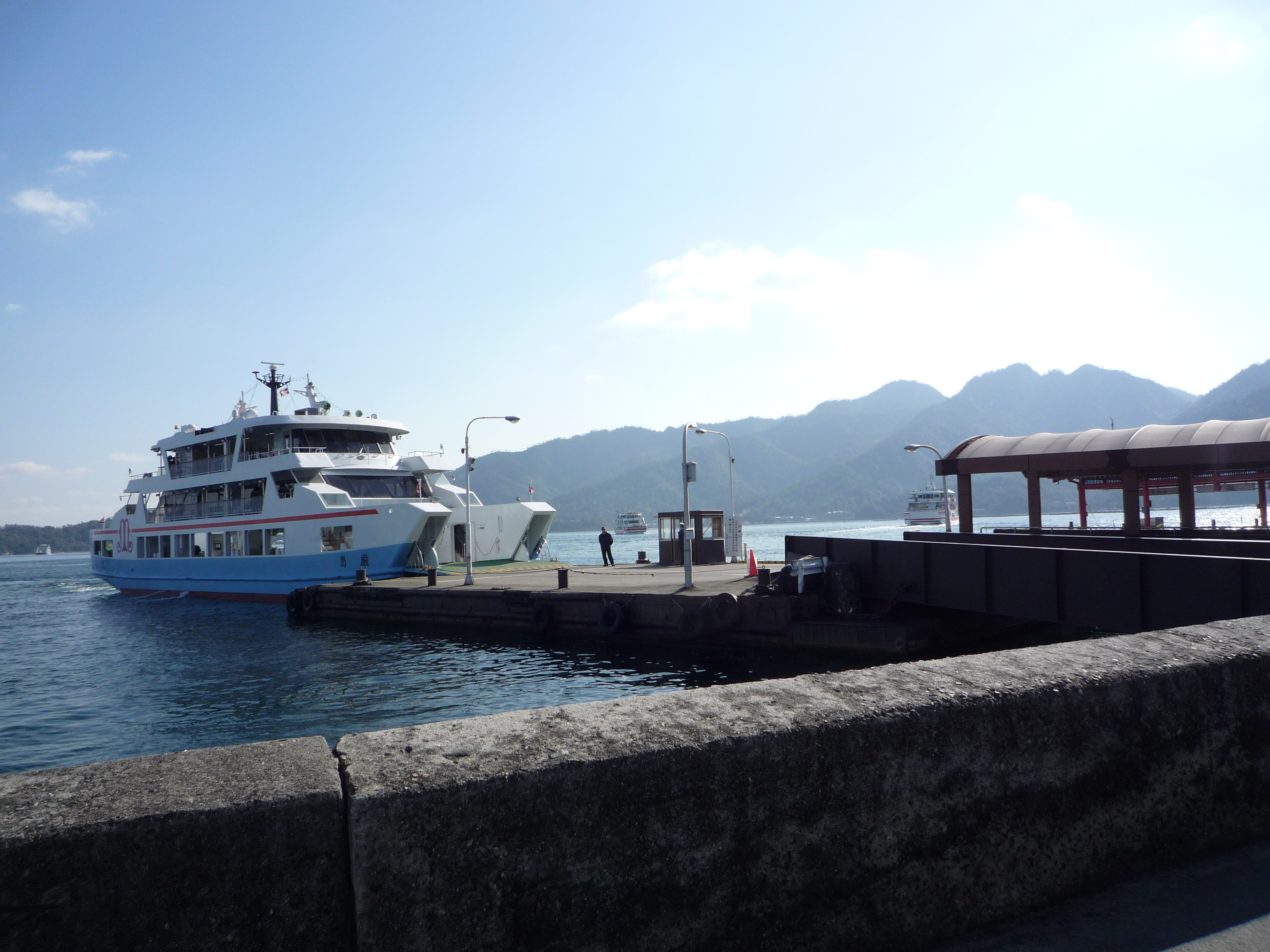 宮島口桟橋